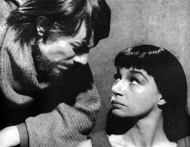 Pjäsen Antigone av Sofokles. Antigone spelad av Ulla Sjöblom och Kreon av Olof Widgren. TV-teater 1960